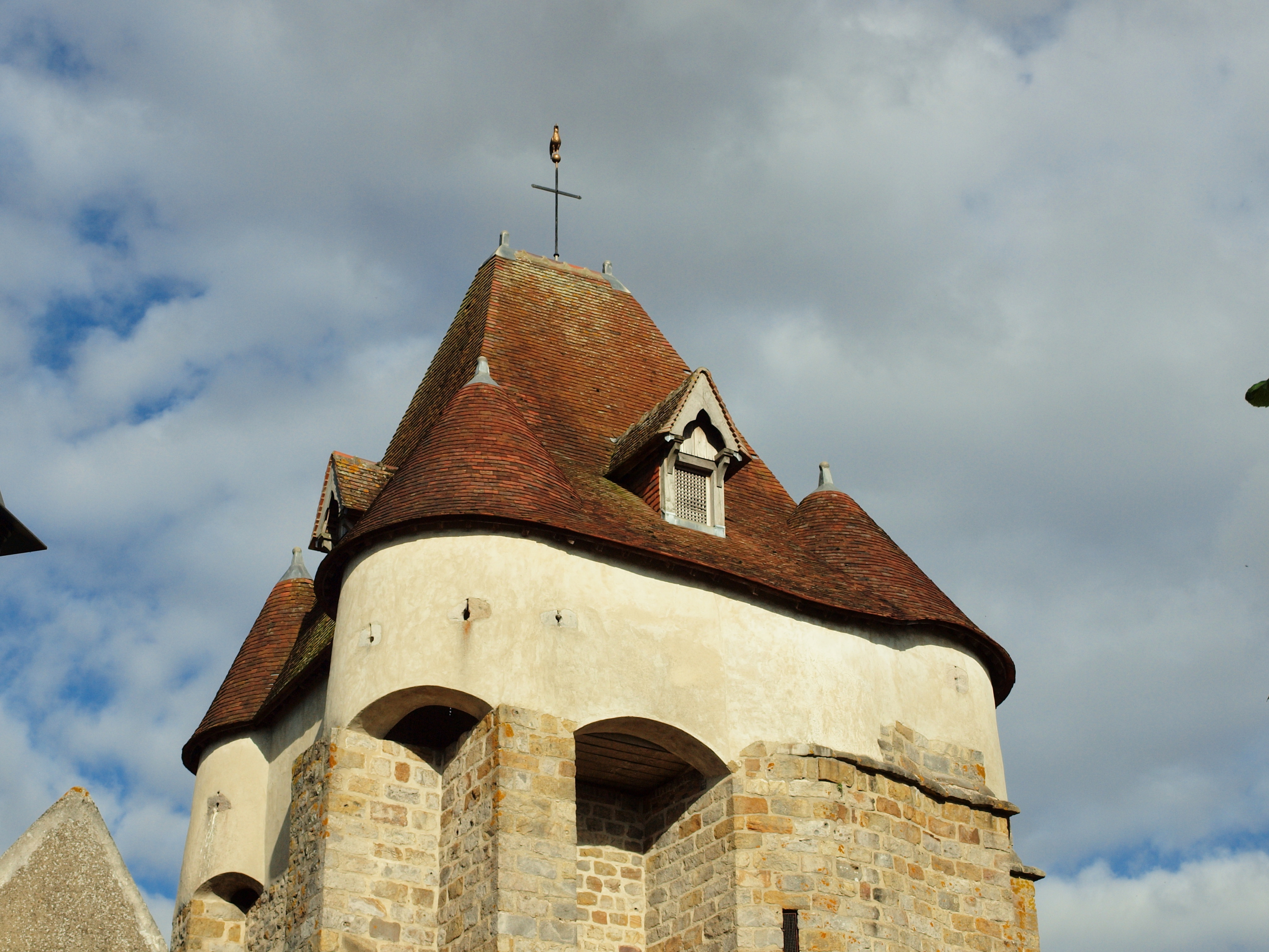 Église Saint-Étienne de Soucy (Yonne, France)